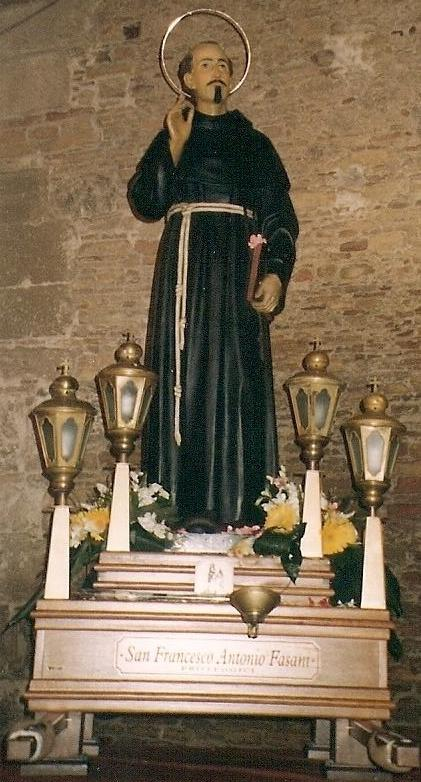 Statua di San Francesco Antonio Fasani dinnanzi il suo Santuario al termine della processione del 29 novembre 2007